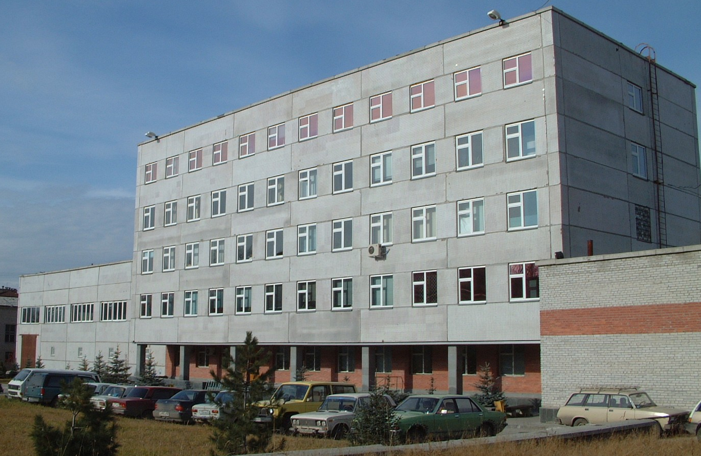 Здание, в котором на первом и втором этажах располагаются офисные и лабораторные помещения Компании TAIRUS, пристройка слева – производственный ростовой цех TAIRUS. Фото 1992 г.